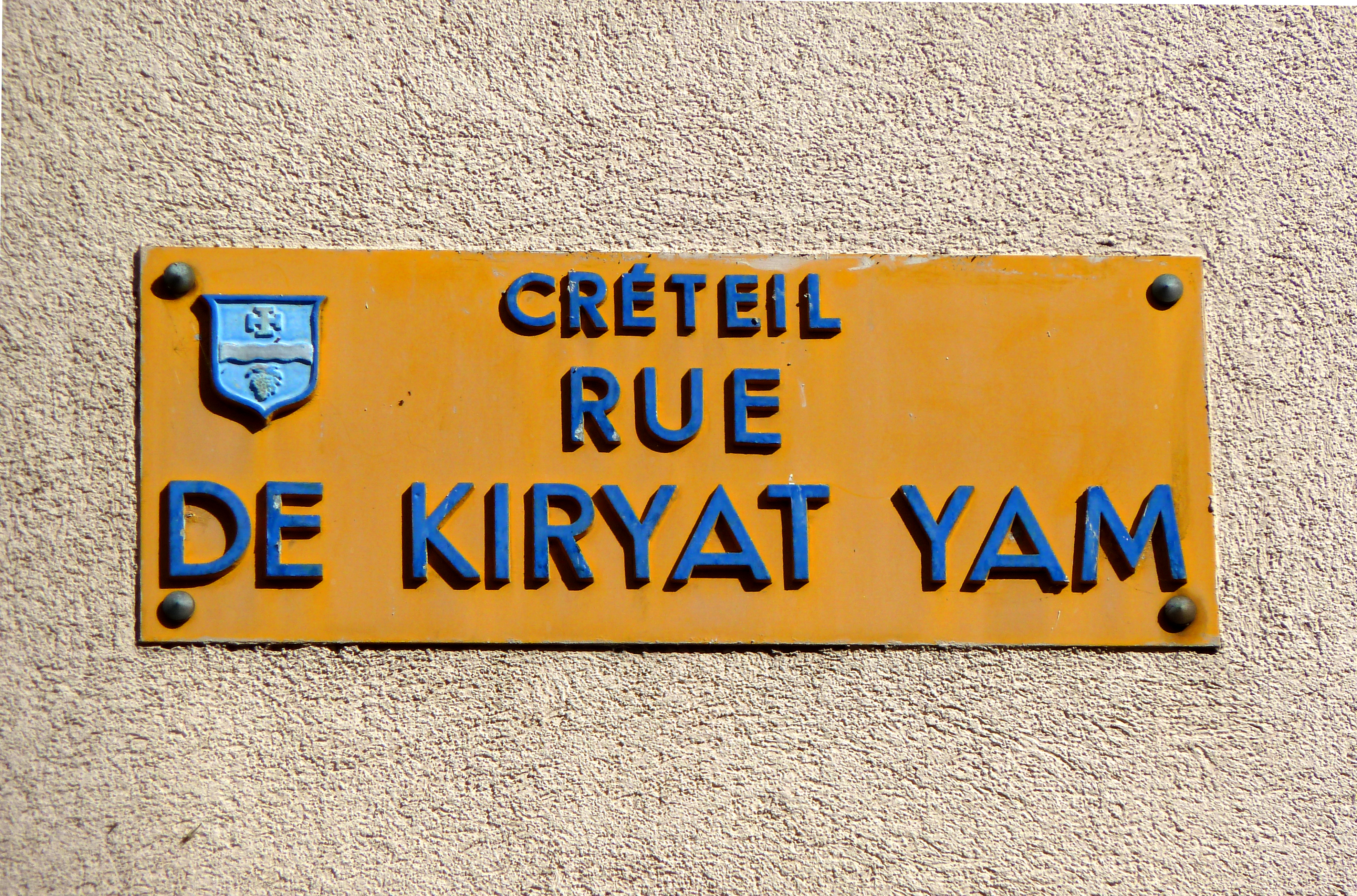 Créteil (Val-de-Marne, France) - Rue de Kiryat-Yam (ville jumelée), plaque.